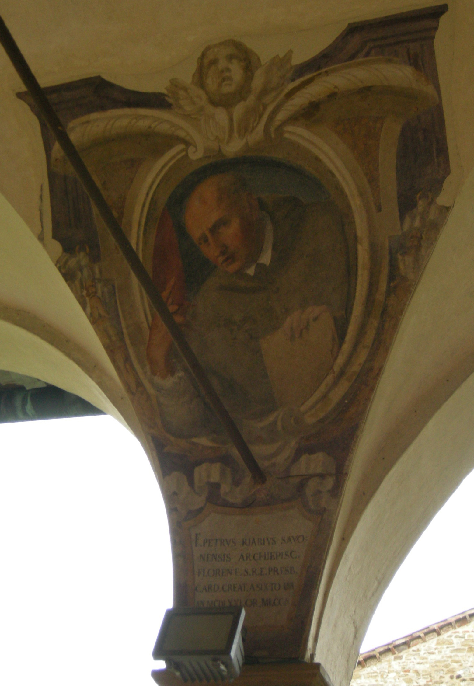 Chiostro di ognissanti, personalità francescane 37 pietro riario